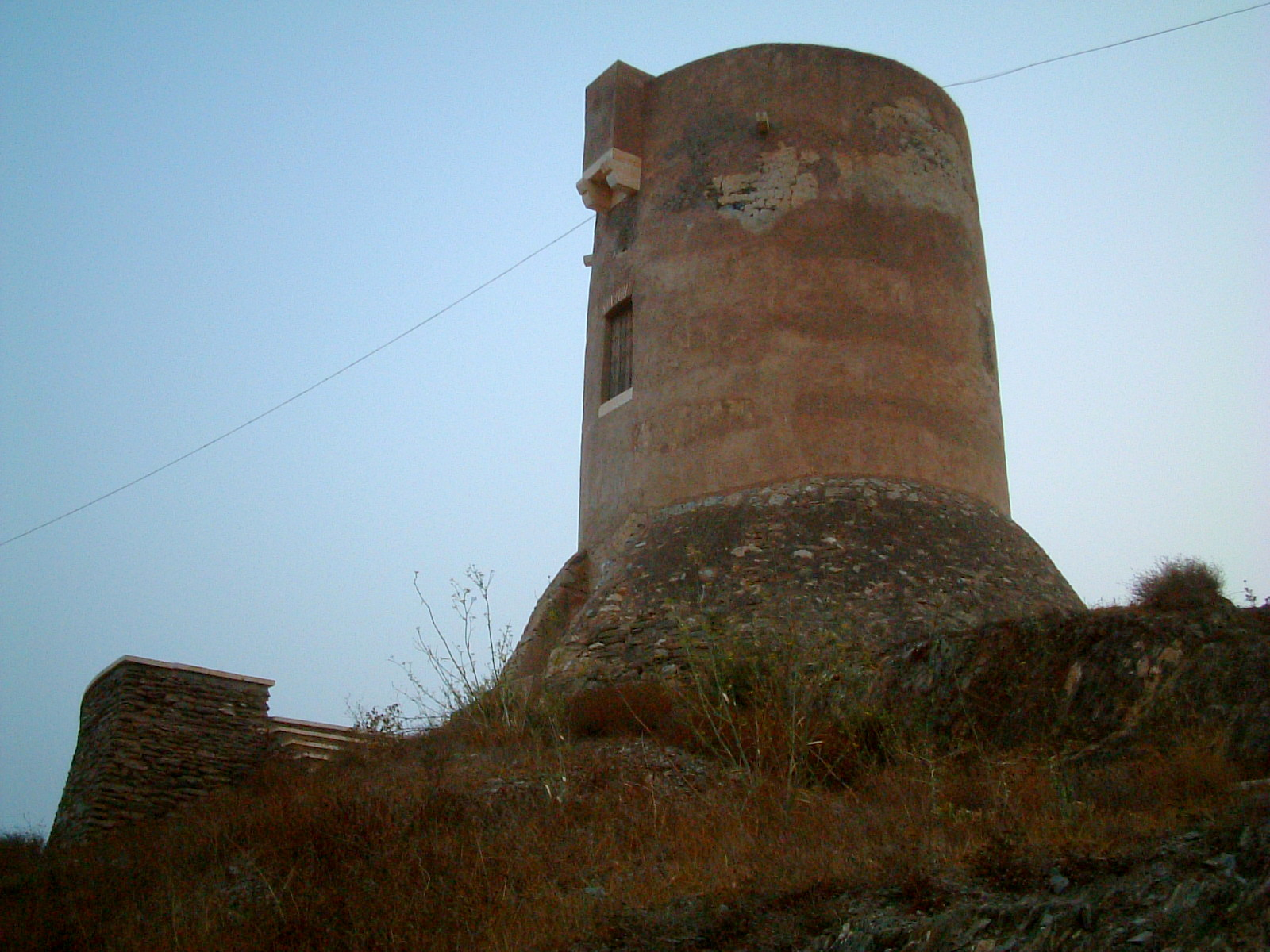 Torre vigía de Guainos